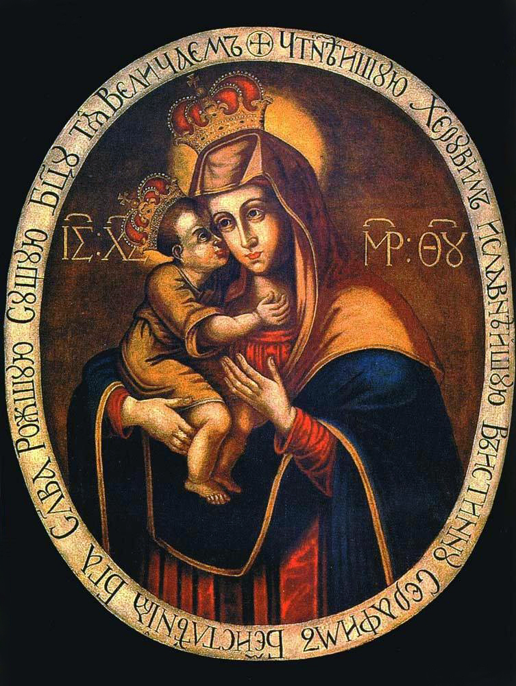 Беларуская (тарашкевіца): Абраз Маці Божай Жыровіцкай з Быценскага манастыра базылянаў